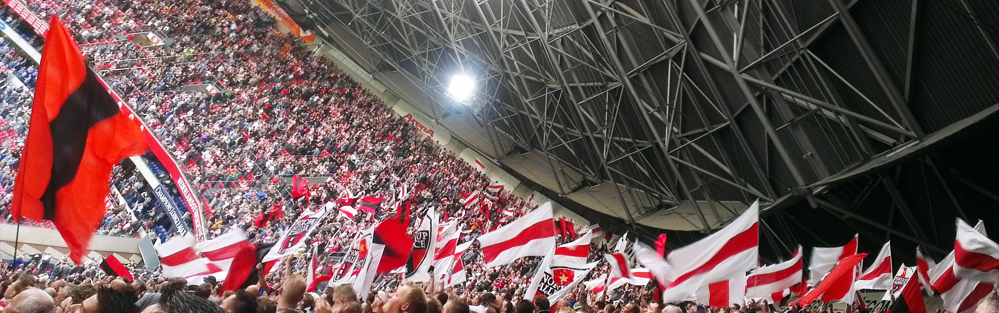 De Amsterdam ArenA tijdens de wedstrijd AFC Ajax - RKC Waalwijk op 15-09-2012.